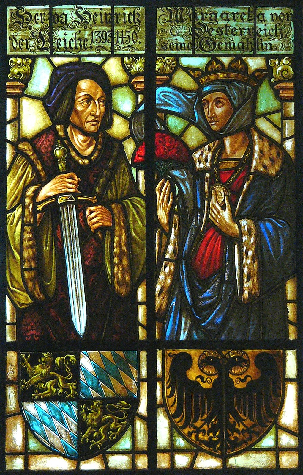 Landshut, Altstadt 315, Rathaus. Fenster in Haupttreppenhaus. Dargestellt sind Heinrich der Reiche und Margarete von Österreich.This is a photograph of an architectural monument.